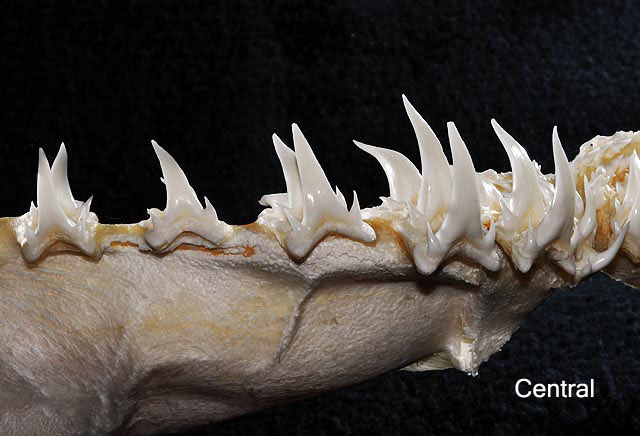 Odontaspis noronhai